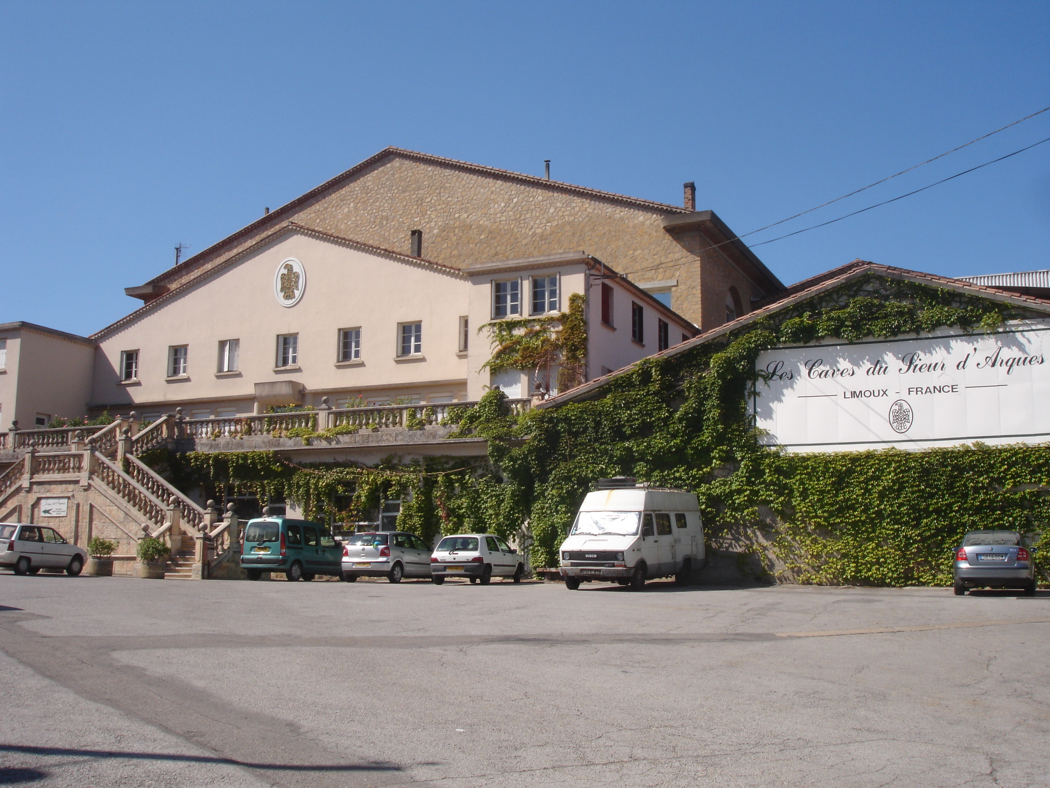 Limoux (Aude, Languedoc-Roussillon, France) - Coopérative Sieur d'Arques, réception clients.